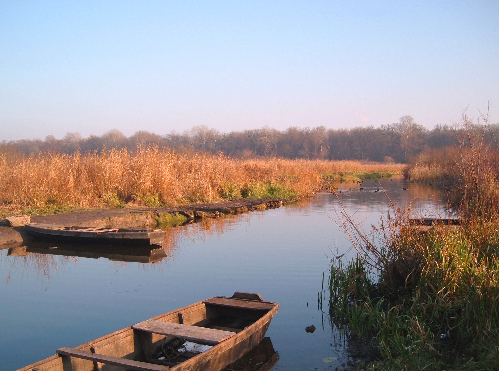 Обедска бара, 2004. година